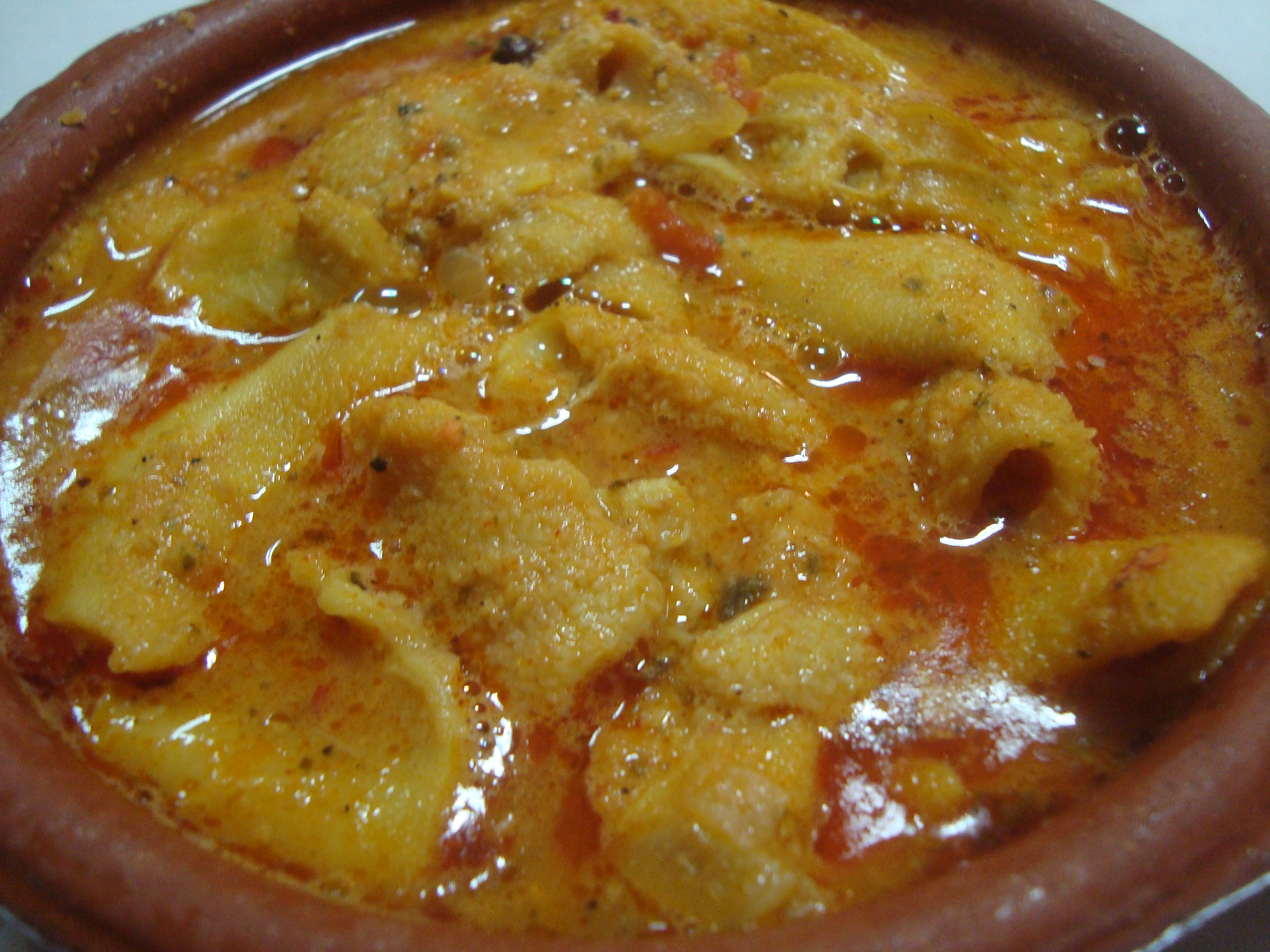 Cazuela de callos de cordero